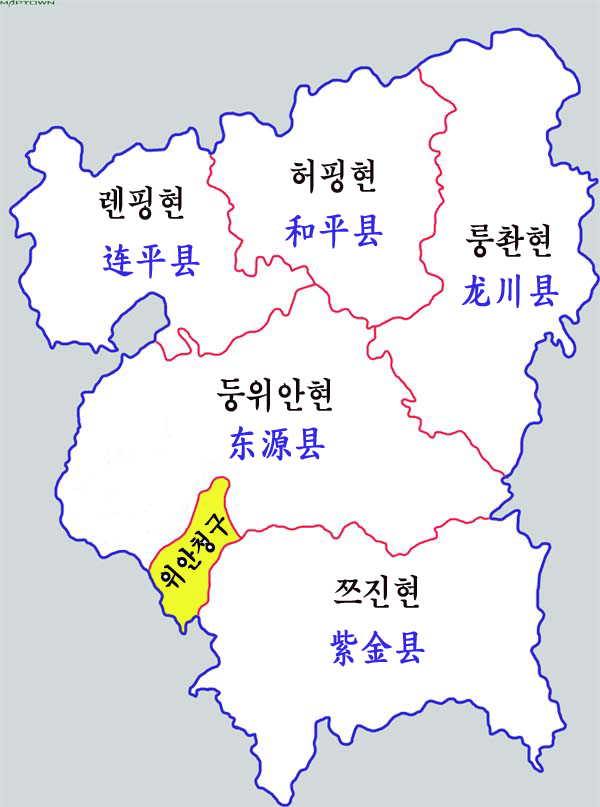 허위안시 현급구역